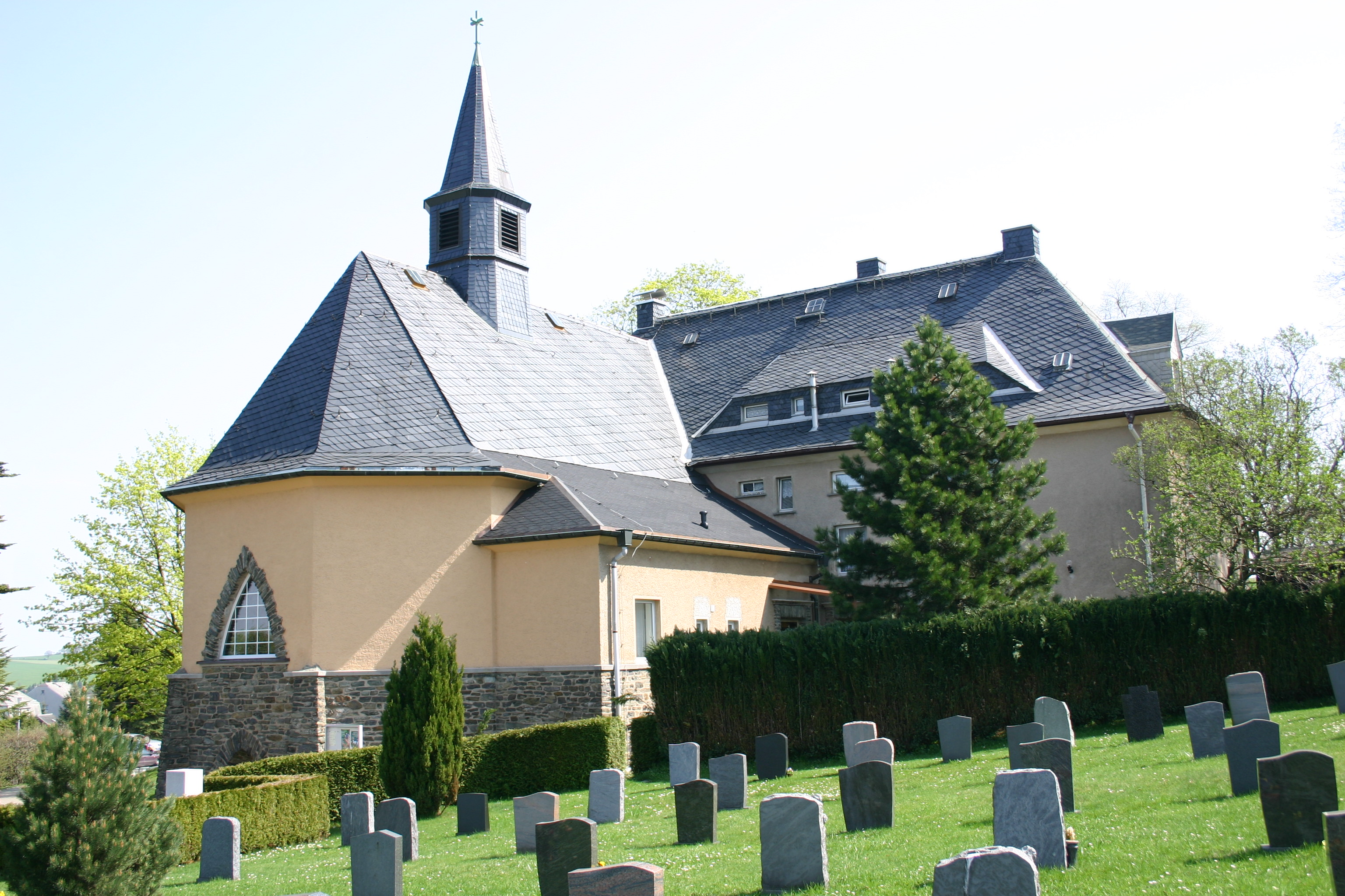 Die Gornauer Kirche von Westen gesehen